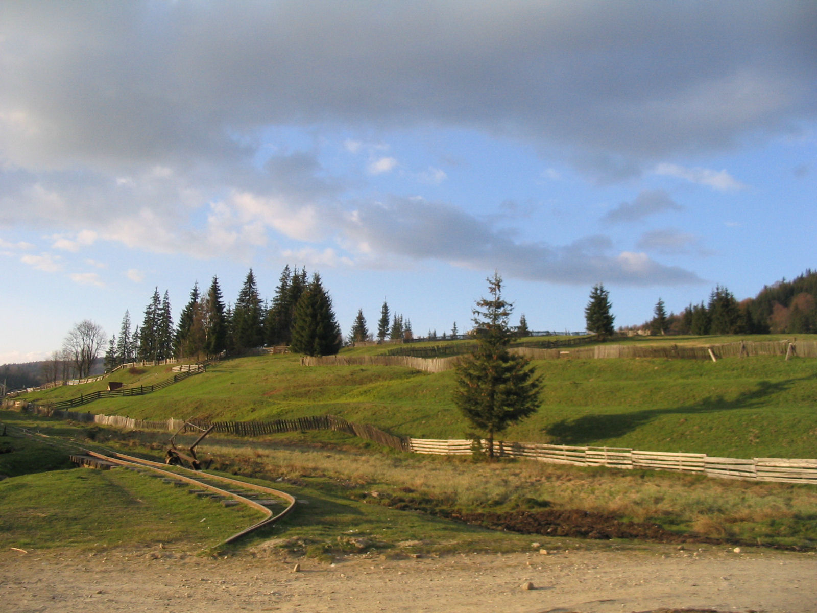 Kommandó